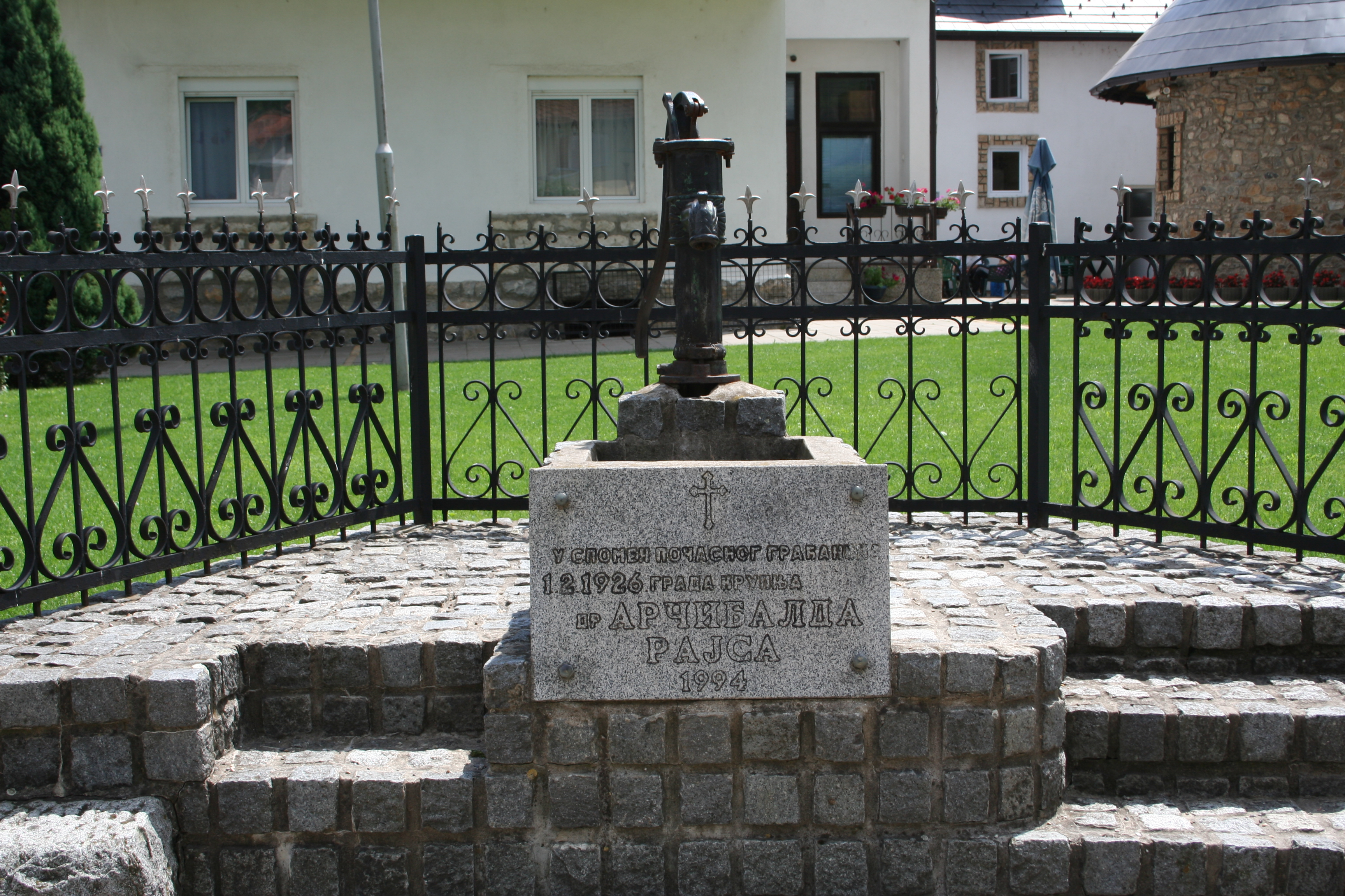 Crkva Vaznesenja Gospodnjeg (nova), Spomen česma dr Arčibaldu rajsu, Krupanj